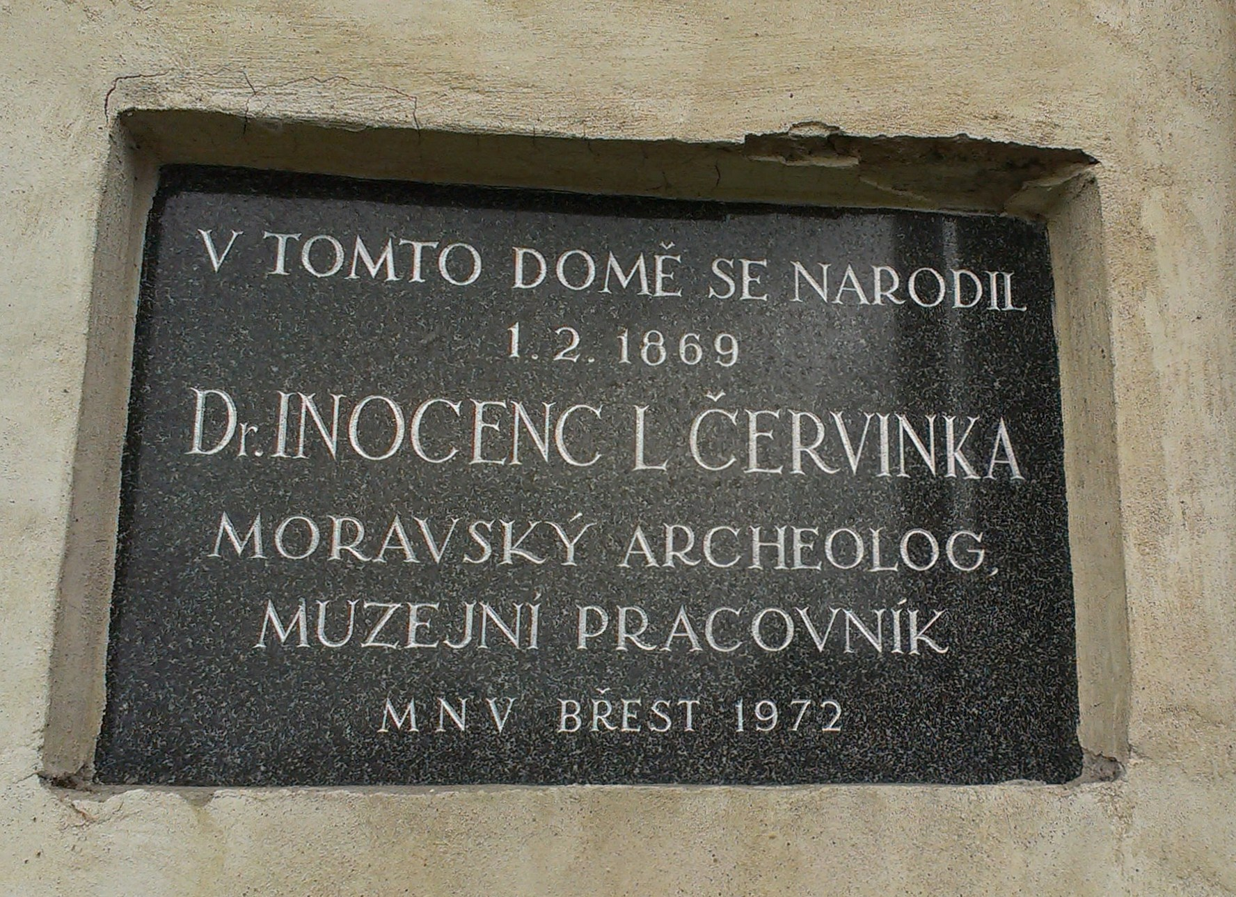 Inocenc Ladislav Červinka - pamětní deska na rodném domě Břest č.p. 108